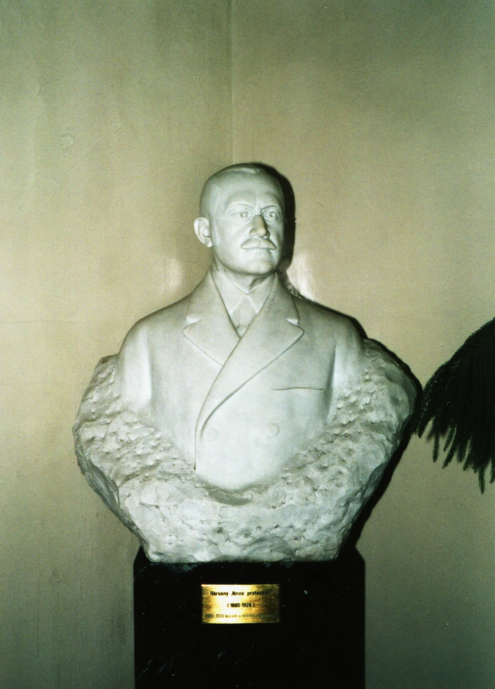 Bársony János mellszobra, Vastagh László alkotása